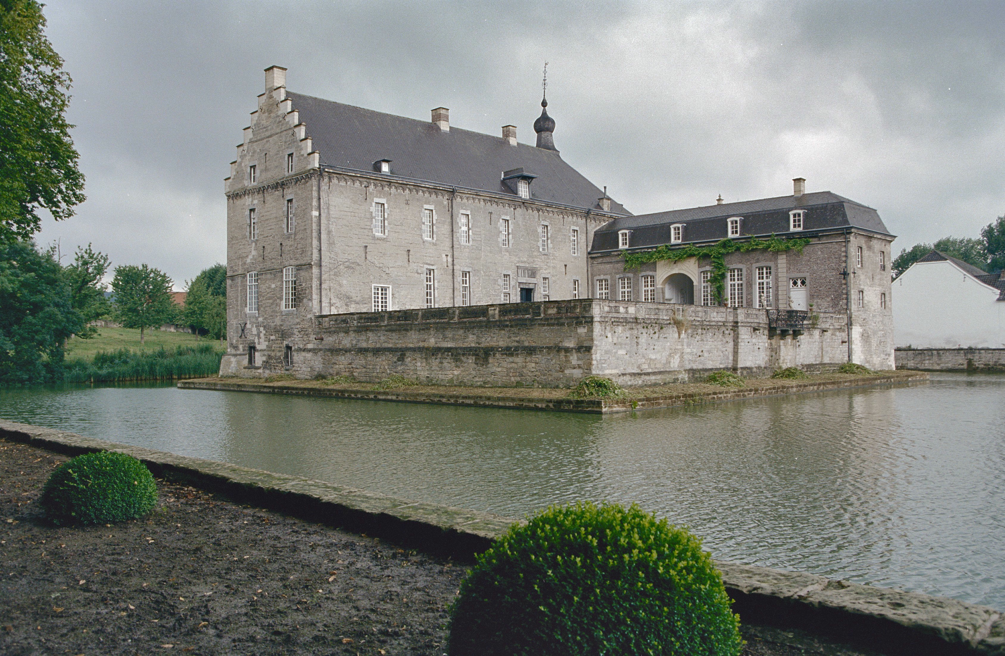 Kasteel Genhoes: Overzicht met omgrachting